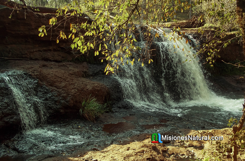 Salto Pepe en la localidad de Gobernador Lopez